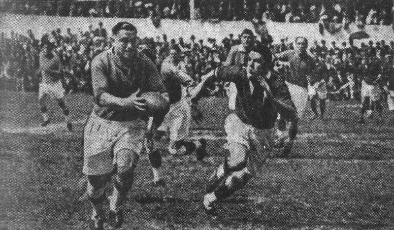 Photo en finale de la Coupe de France de rugby à XIII entre Roanne et Villeneuve en 1938